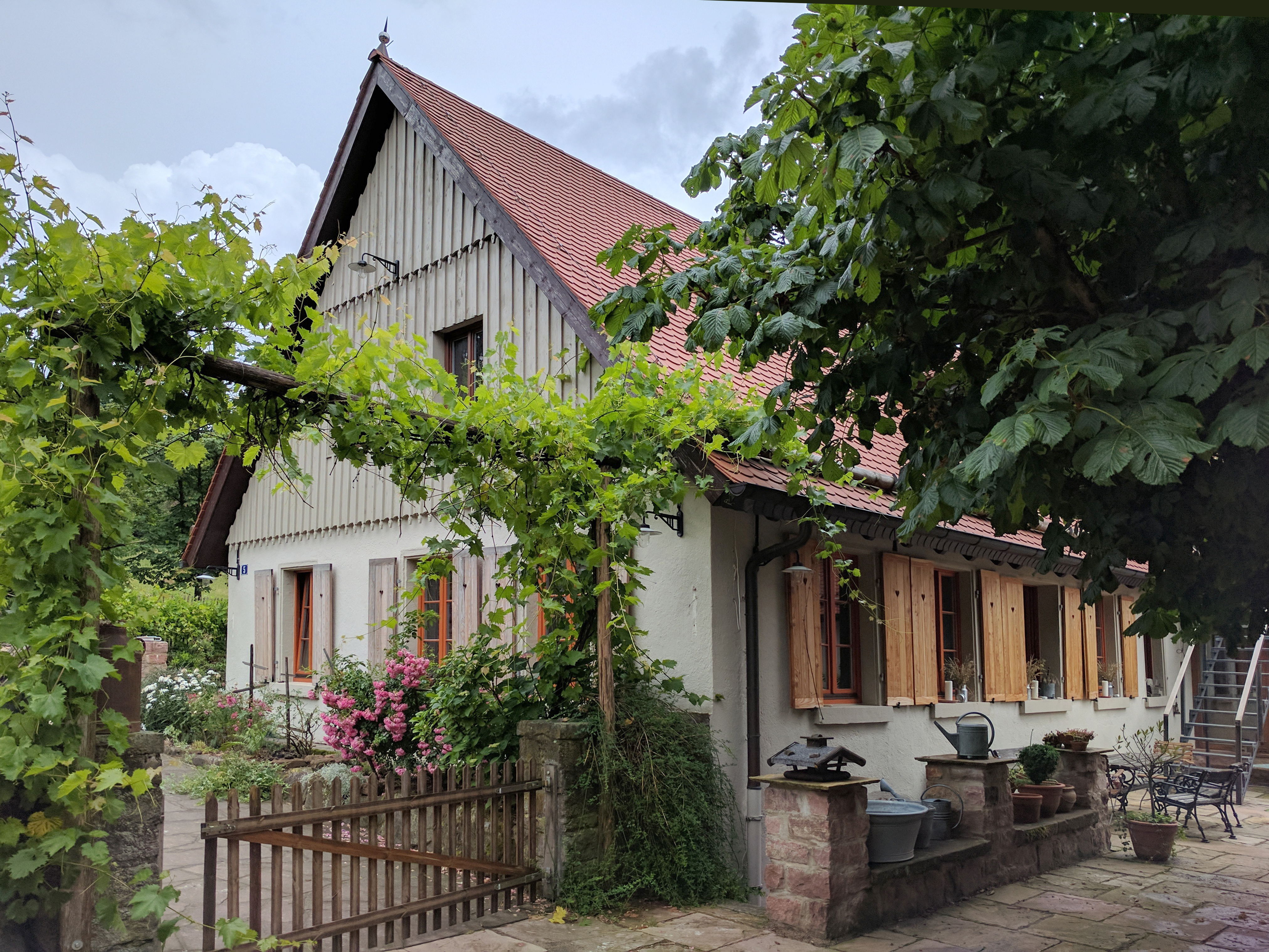 Blick auf das Gasthaus Alter Kohlhof in Heidelberg. Foto: M. Hofbauer, Juni 2017